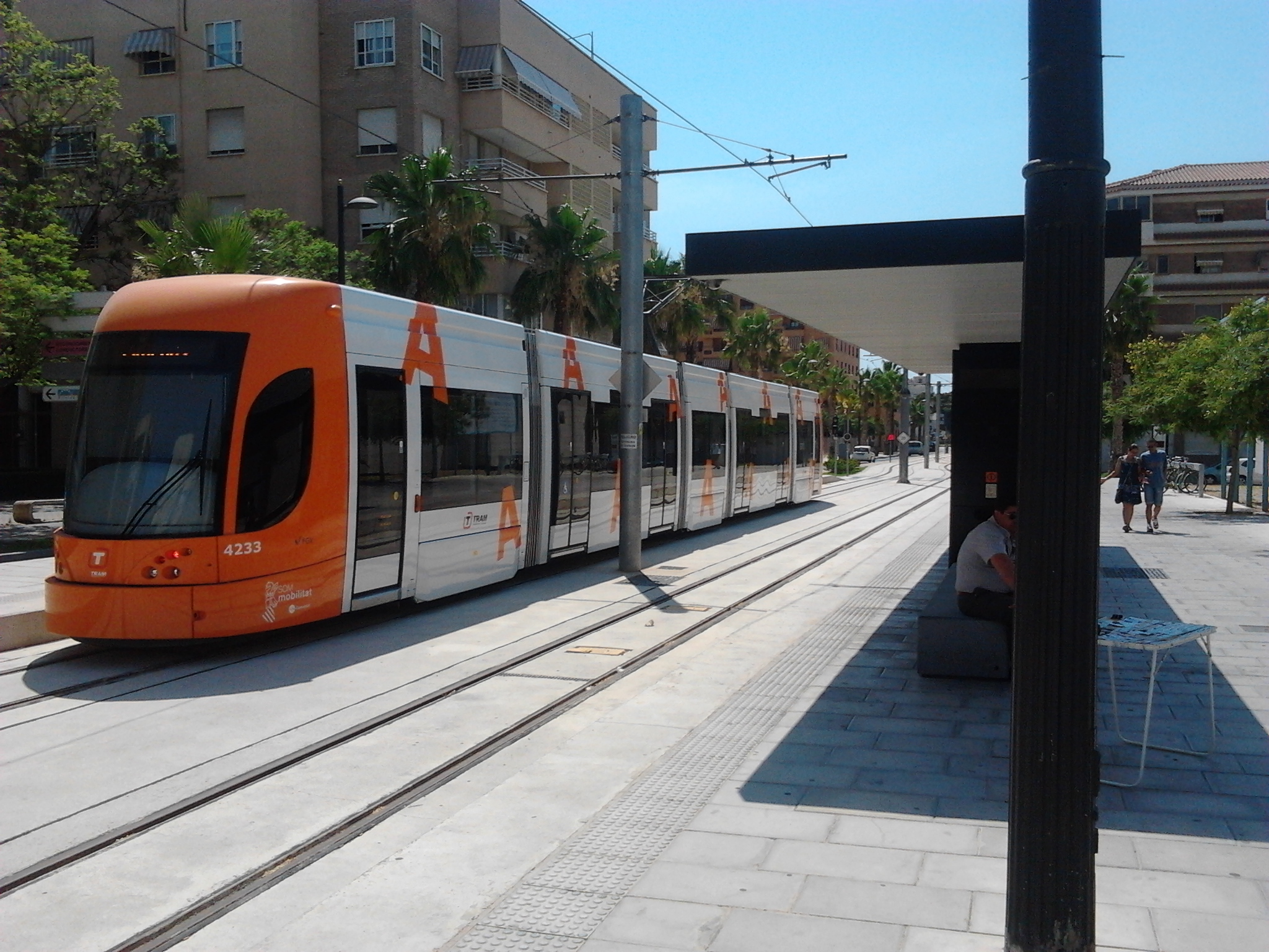 Tranvía serie 4200 de Bombardier en San Vicente del Raspeig